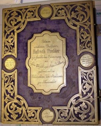 Fotoalbum für Prof. Pressler von Schülern und Kollegen ab 1867